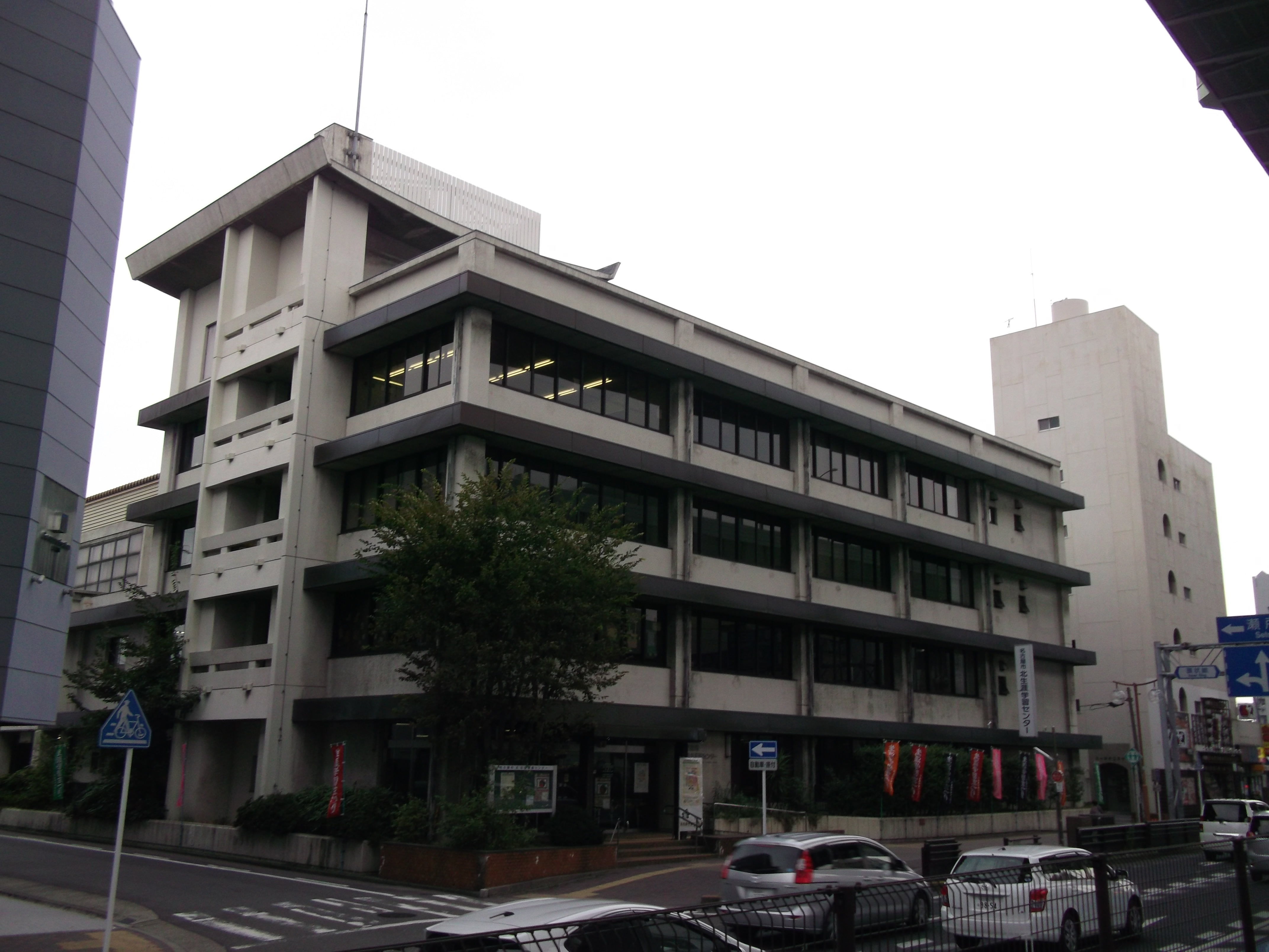 名古屋市北区黒川本通に所在する名古屋市北生涯学習センター（旧北社会教育センター・北区役所庁舎）